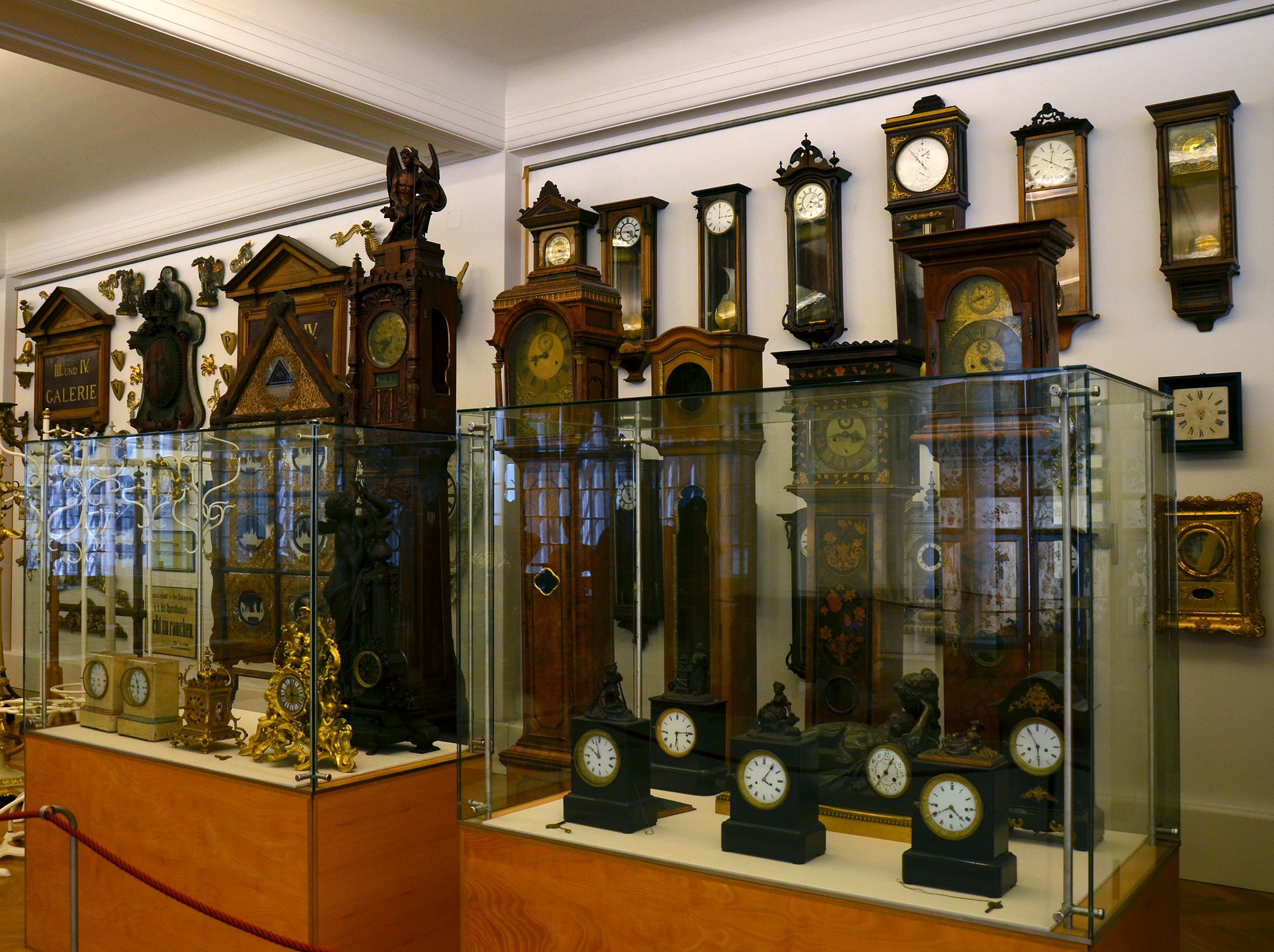 Le Garde-Meuble Impérial ( Kaiserliches Hofmobiliendepot ) à Vienne.